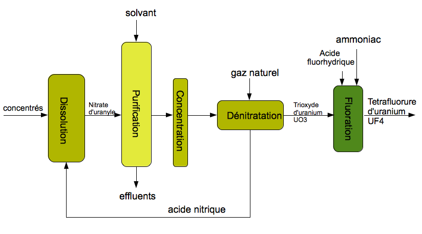 Schéma du nouveau procédé “COMURHEX II” de raffinage de l'uranium à l'Usine Comurhex de Malvési (Narbonne, Aude).